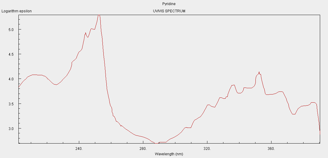 Piridine's uv/vis spectrum